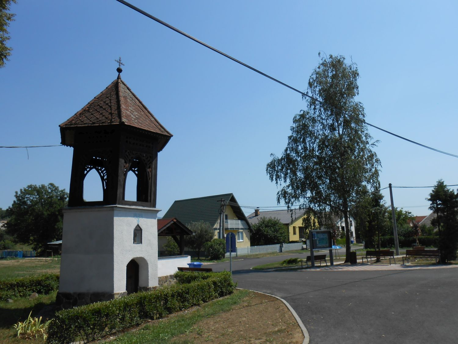 Centrum obce Trsťany